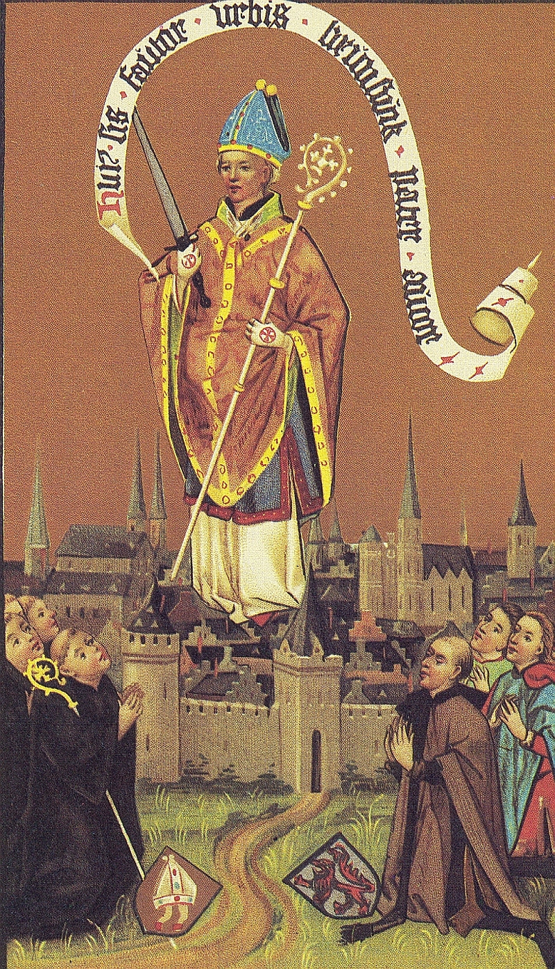 Der Heilige Autor. Seit dem Jahr 1200 Schutzpatron der Stadt Braunschweig.